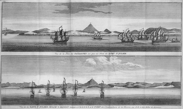 [Illustrations de Voyage autour du monde] Auteur : George Anson Éditeur : Henri-Albert Gosse et Compagnie (Genève) 1750